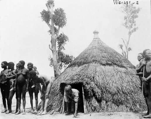 Oubanghi-Chari : cases près d'Alindao. Peuplades très primitives